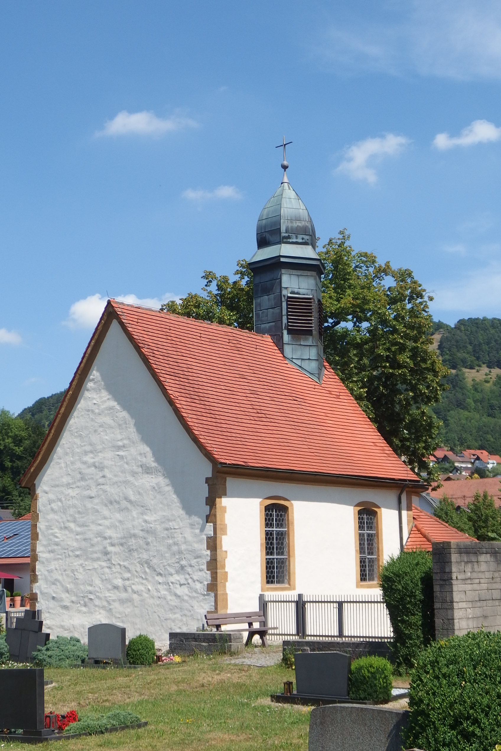 Friedhofskapelle Nenningen, an der ehemaligen Bahnlinie (jetzt Radweg)